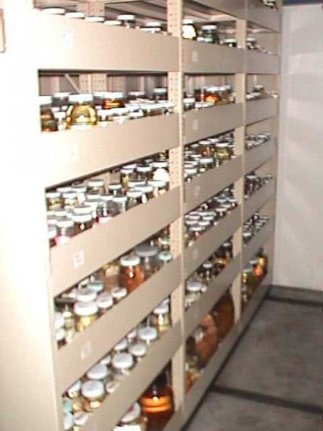 Mobiliario y colección de de custáceos del Museo de Biología de la Universidad Central de Venezuela (MBUCV) hacia 2004 localizada en el Instituto de Zoología Tropical - Universidad Central de Venezuela - Caracas – Venezuela